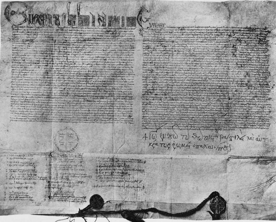 Unionsbulle Eugens IV. vom Florentiner Konzil 1439, zweisprachig mit griechischer Unterschrift des byzantinischen Kaisers, Bleibulle des Papstes und Goldbulle des Kaisers